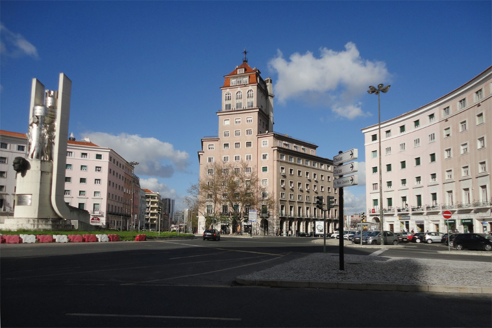 Largo do Areeiro, Lisboa; Arq. Cristino da Silva